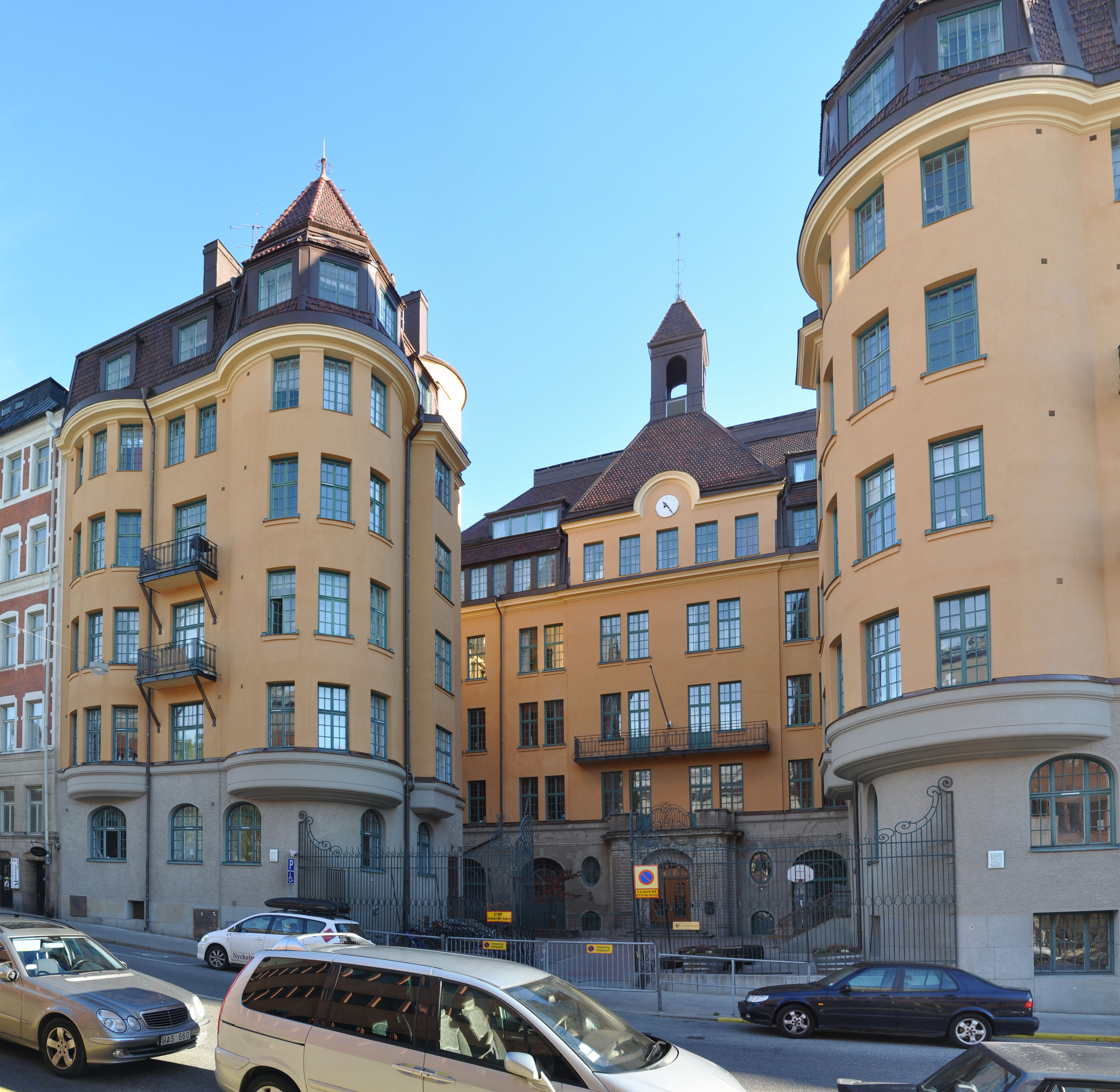 Åhlinska skolan